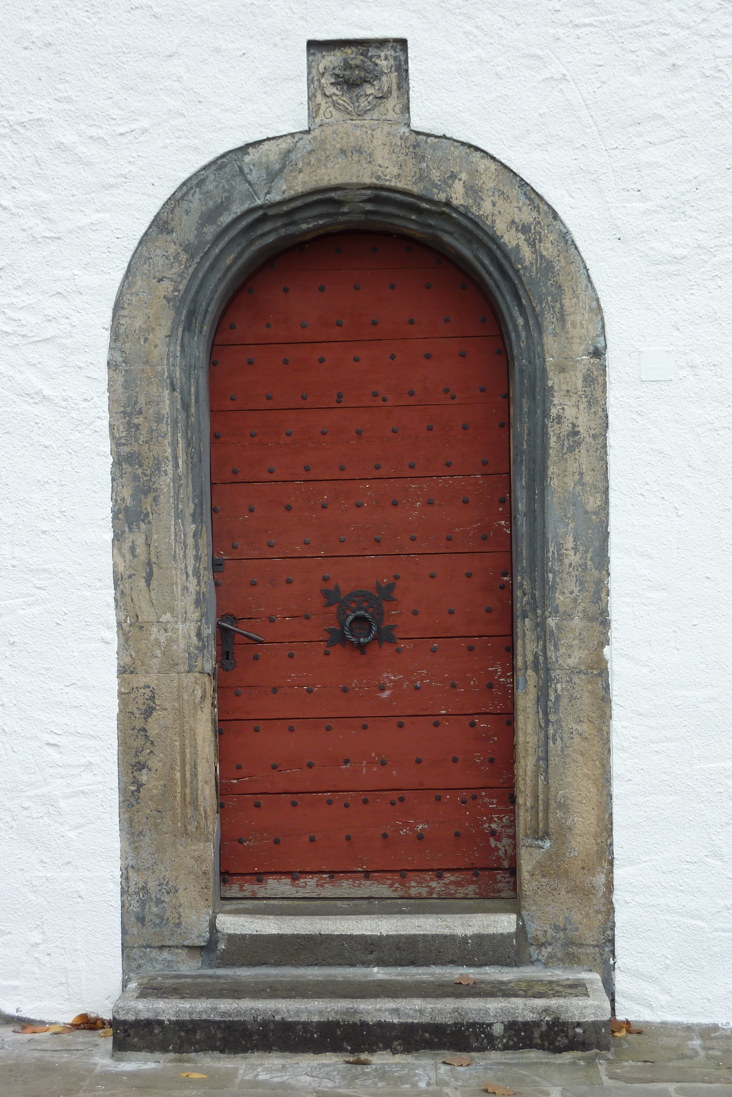 Filialkirche St. Simon und Judas in Herschbroich, Portal